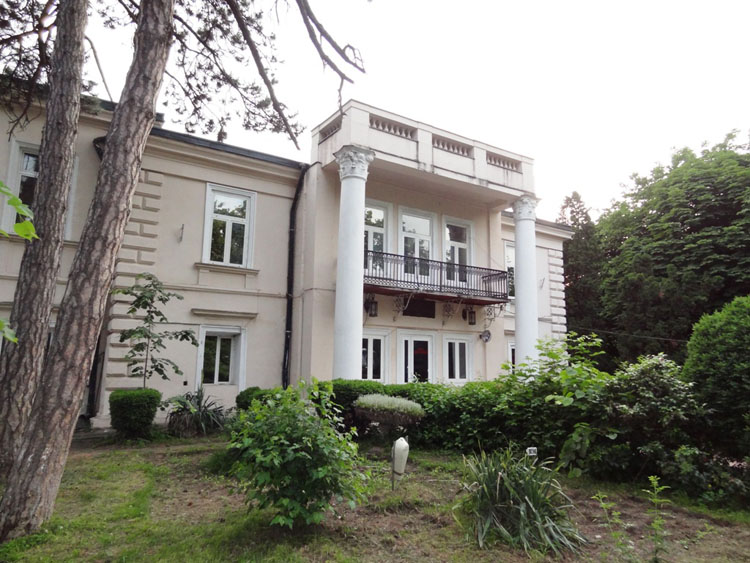 Casa Logofătului Nicolae Canta, azi Restaurant „Casa Universitarilor”